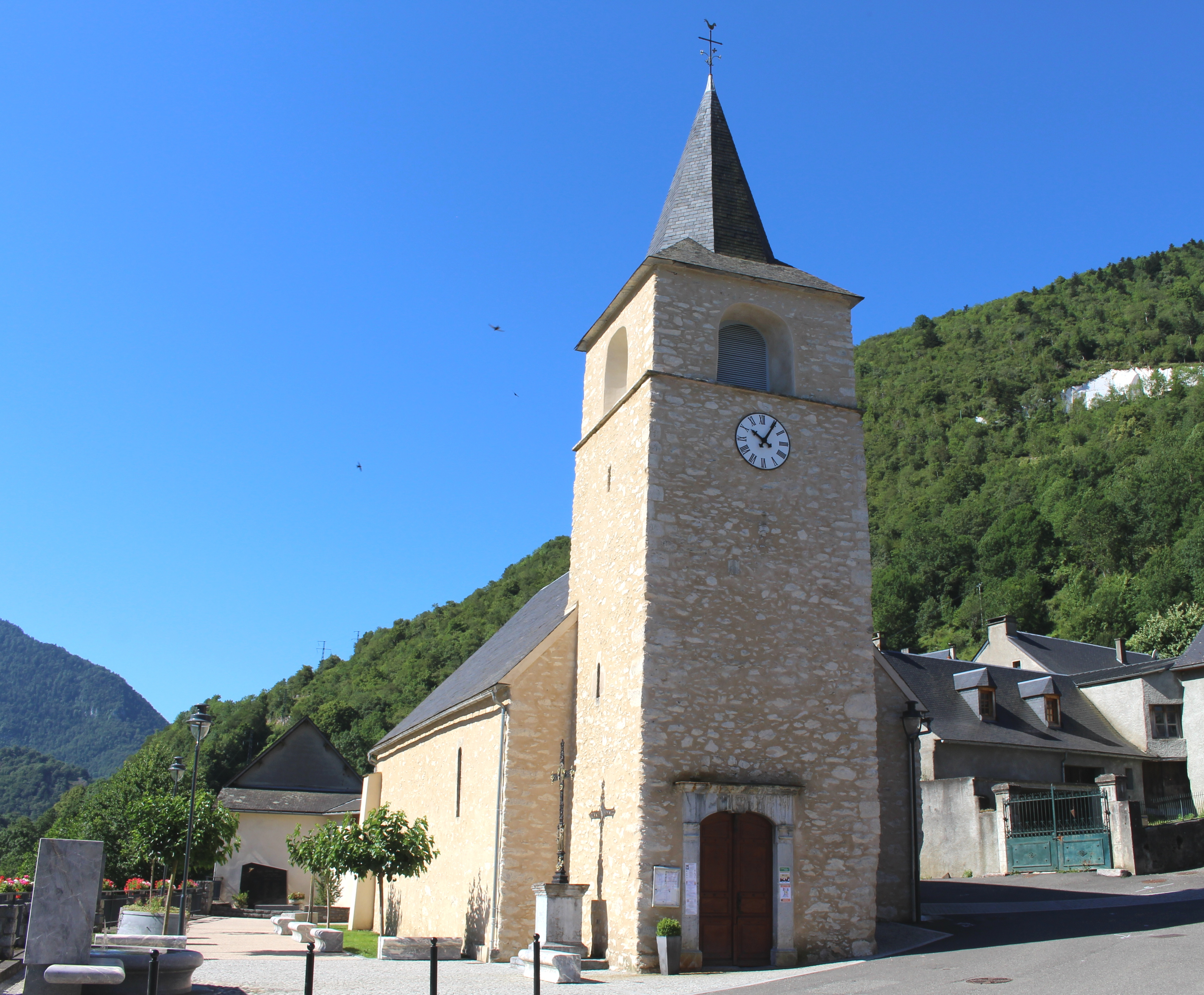 Église Saint-Martin de Beyrède (Hautes-Pyrénées)